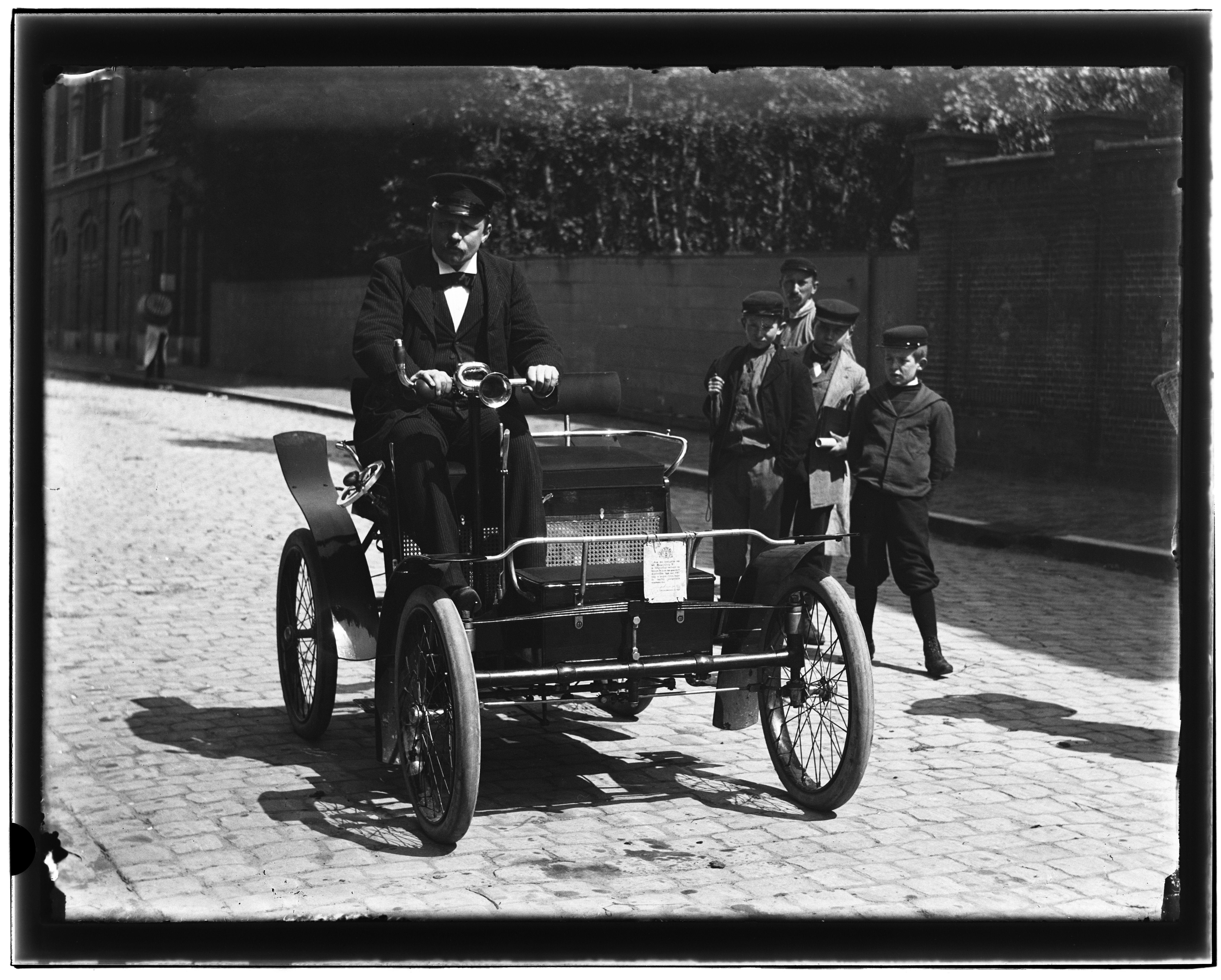 Beschrijving Huidekoperstraat (tussen nrs.) 25-29 Eerste auto van de heer Leonard Lang. Documenttype foto Vervaardiger Olie``, Jacob (1834-1905) Collectie Jacob Olie Jbz. Geografische naam Huidekoperstraat Inventarissen Afbeeldingsbestand 10019A000748 Generated with Dememorixer